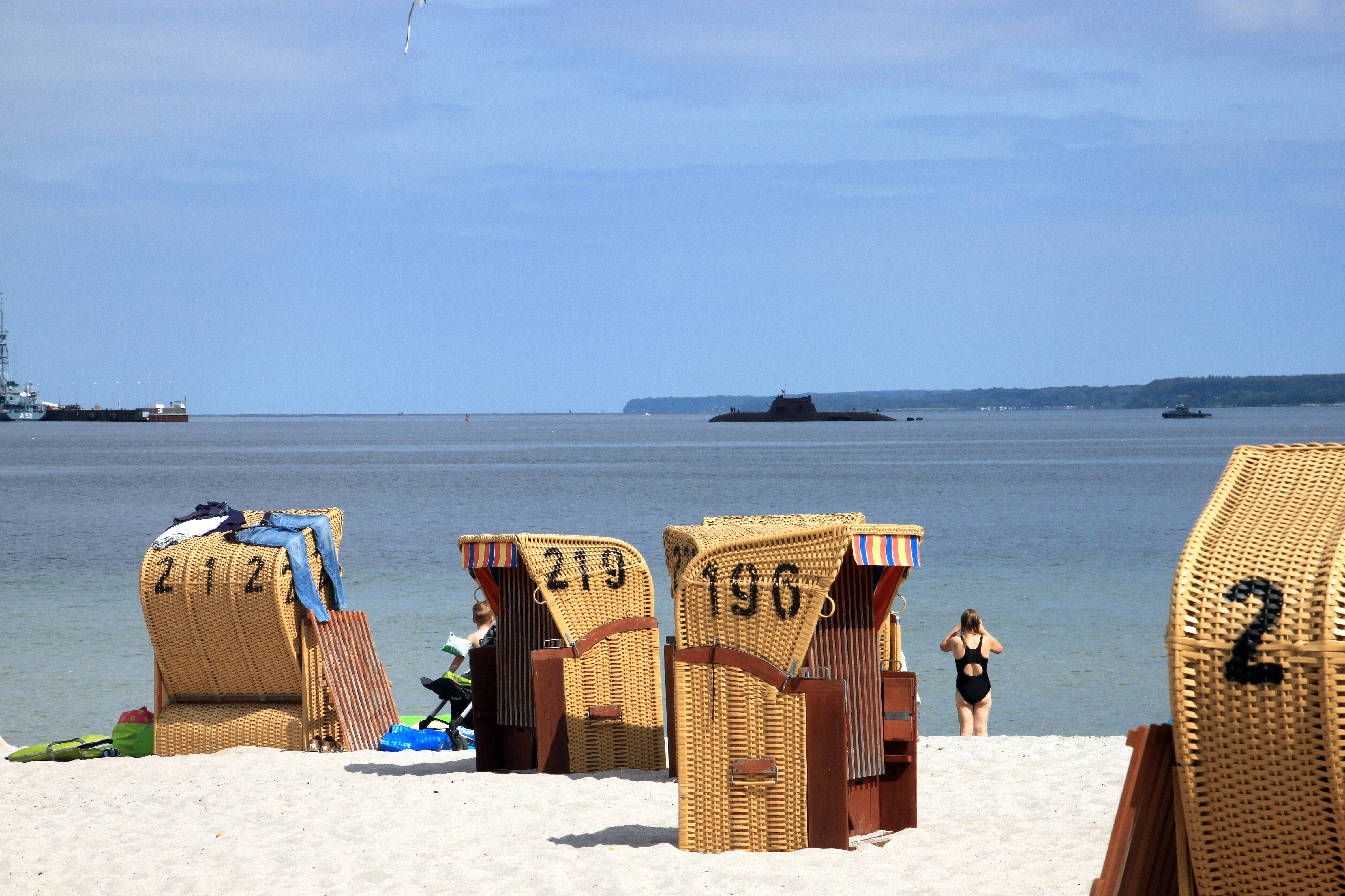 Ein etwas anderer Gast - U-Boot